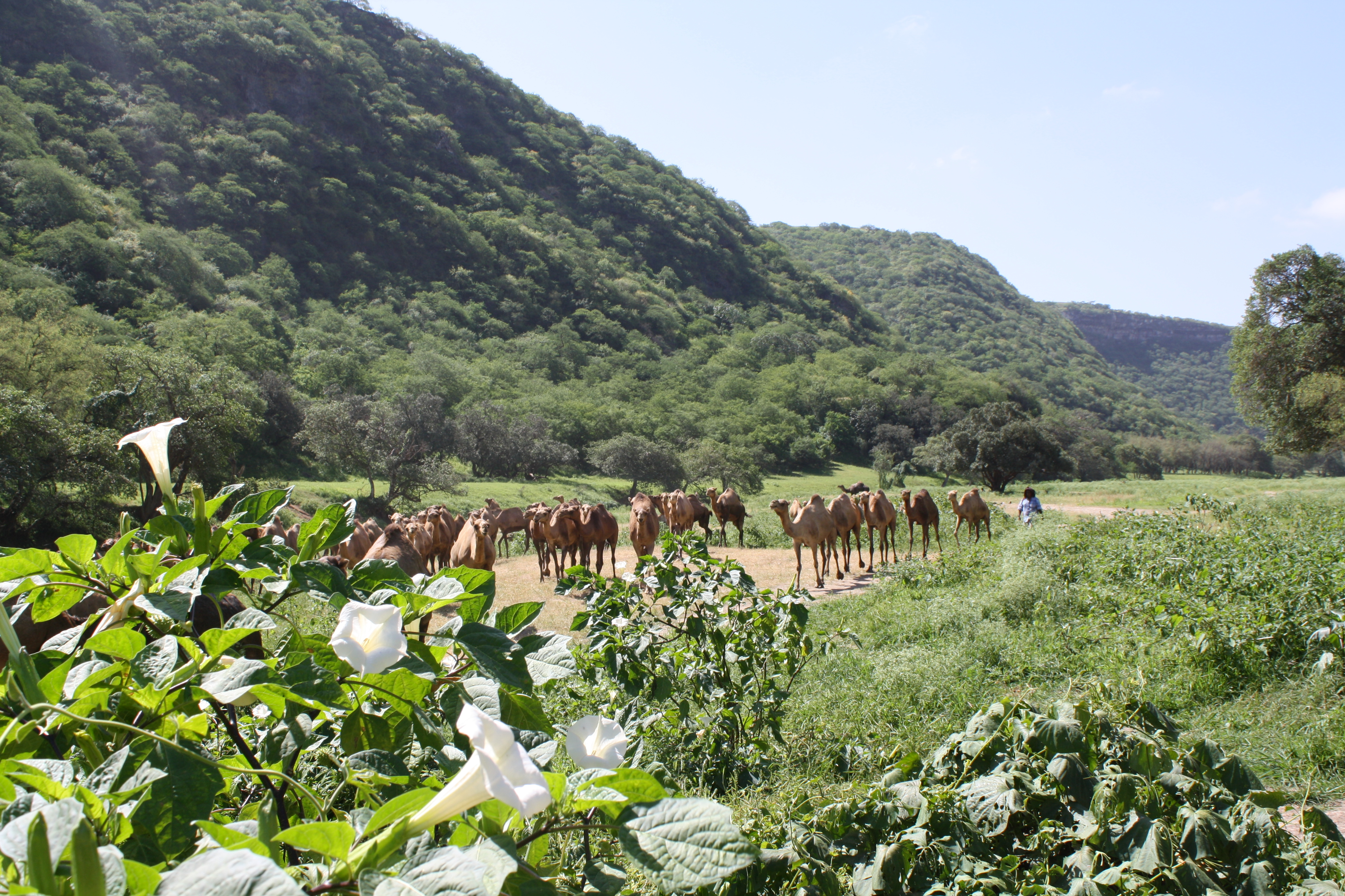 Salalah camels